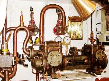 Duplexpumpe als Universalpumpe auf dem Dampfschlepper Woltman